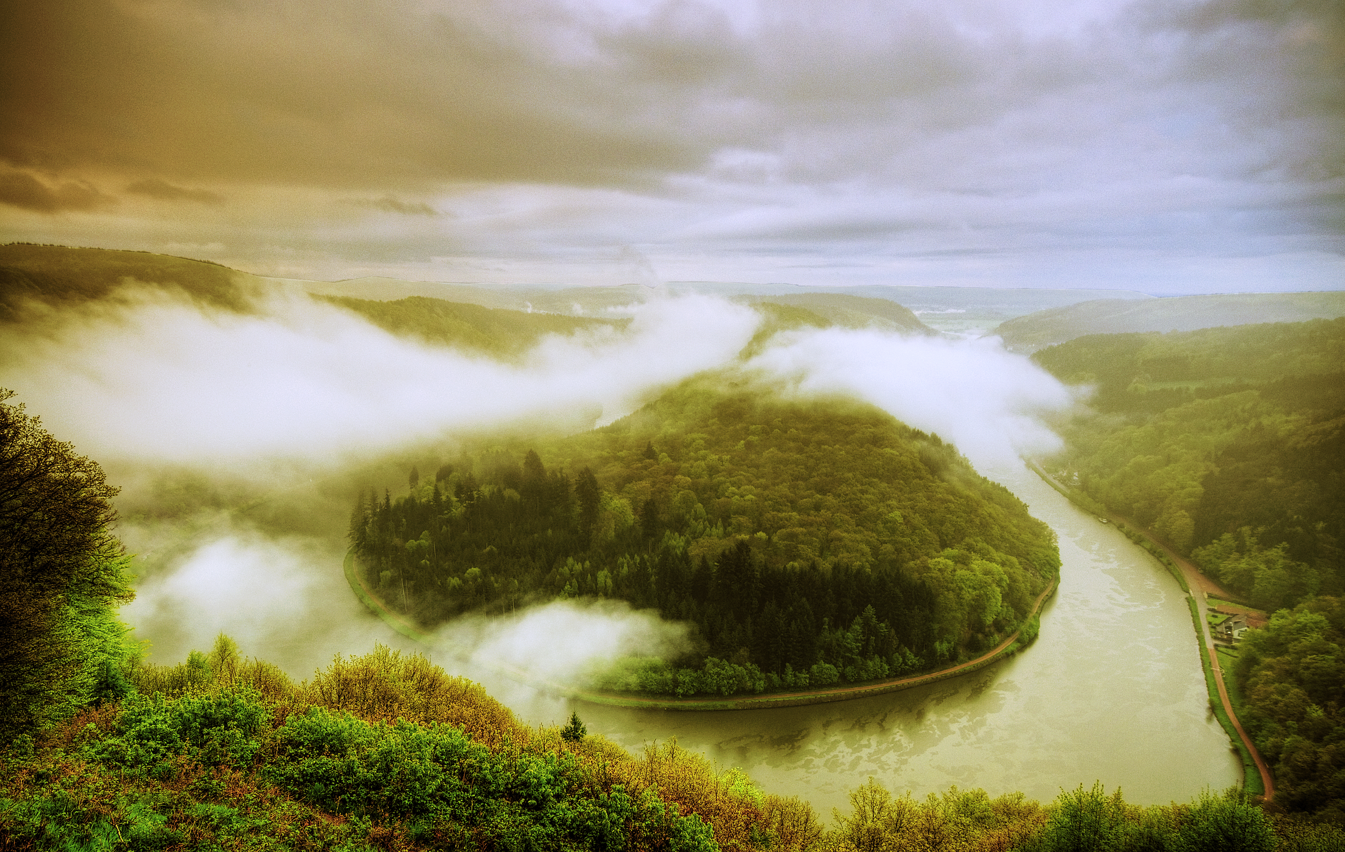 Die Saarschleife, Durchbruchstal der Saar durch den Taunusquarzit, gehört zu den bekanntesten Sehenswürdigkeiten des Saarlandes. Die schönste Ansicht bietet der Aussichtspunkt Cloef im Mettlacher Ortsteil Orscholz, 180 m hoch über dem Fluss. Auch unmittelbar vom Saarufer aus bieten sich imposante Ausblicke. Steil zerklüftete Felswände wechseln mit Schutthalden und kleinen Schluchten ab. Die Saarschleife beginnt kurz hinter Merzig beim Stadtteil Besseringen und endet in Mettlach. Die Luftlinie zwischen Besseringen und Mettlach beträgt nur etwa zwei Kilometer. Die Saar macht einen romantischen "Umweg", der nahezu zehn Kilometer beträgt. Auf dem bewaldeten Bergrücken innerhalb der Saarschleife befinden sich die Kirche St. Gangolf mit Teilen der ehemaligen Klosteranlage und die Burgruine Montclair. Einziger Ort in der Saarschleife ist das Dorf Dreisbach (Saar), wo man mit einer Fähre übersetzen kann. Die Saarschleife gilt als das Wahrzeichen des Saarlandes. Ins Rampenlicht rückte sie immer wieder, wenn Staatsoberhäupter sich dort einfanden: Friedrich Wilhelm IV., König von Preußen besuchte den Aussichtspunkt Cloef mit Blick auf die Saarschleife am 29. September 1856. Der "Führer und Reichskanzler" Adolf Hitler besichtigte sie am 16. Mai 1939. Der Bundeskanzler Konrad Adenauer traf sich dort am 25. Juni 1965 mit saarländischen Politikern. Oskar Lafontaine und Gerhard Schröder wurden am 4. August 1997 an der Cloef mediengerecht mit der Saarschleife ins Bild gesetzt. Der französische Präsident Jacques Chirac und der polnische Präsident Lech Kaczynski trafen sich an der Saarschleife zum Dreiergipfel mit Bundeskanzlerin Angela Merkel am 5. Dezember 2006.